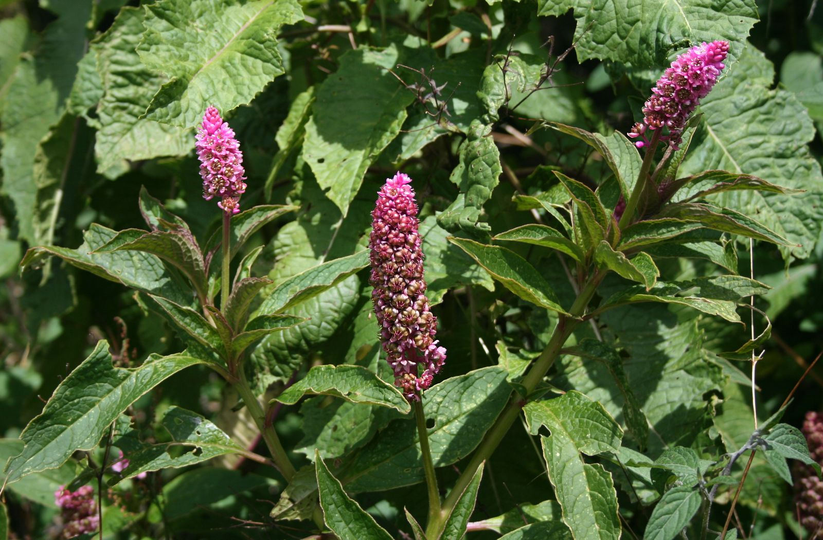 Phytolacca rugosa, Kermesbeerengewächse (Phytolaccaceae) - Costa Rica: Prov. Cartago, Cordillera de Talamanca, Carretera Interamericana N Cerro de la Muerte, ca. km 86, ca. 3150 m